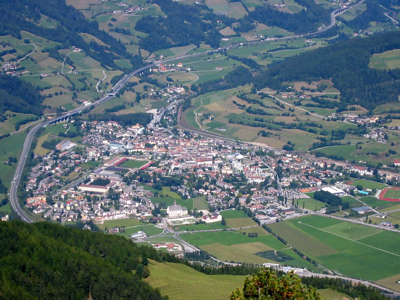 Sterzing in Südtirol